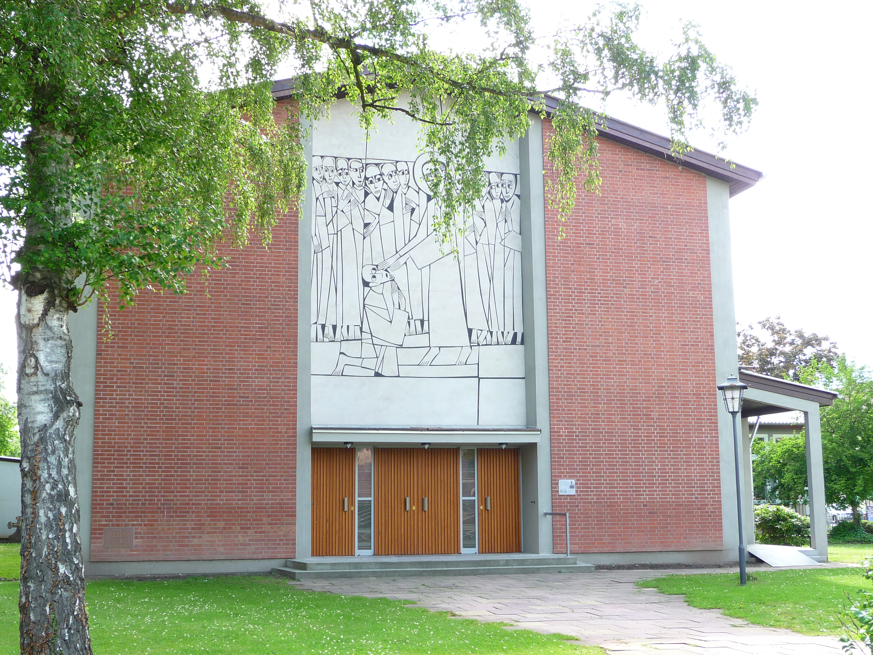 Hauptportal der evangelischen Christuskirche in Oftersheim (Rhein-Neckar-Kreis, Deutschland), Kirche erbaut 1956/57